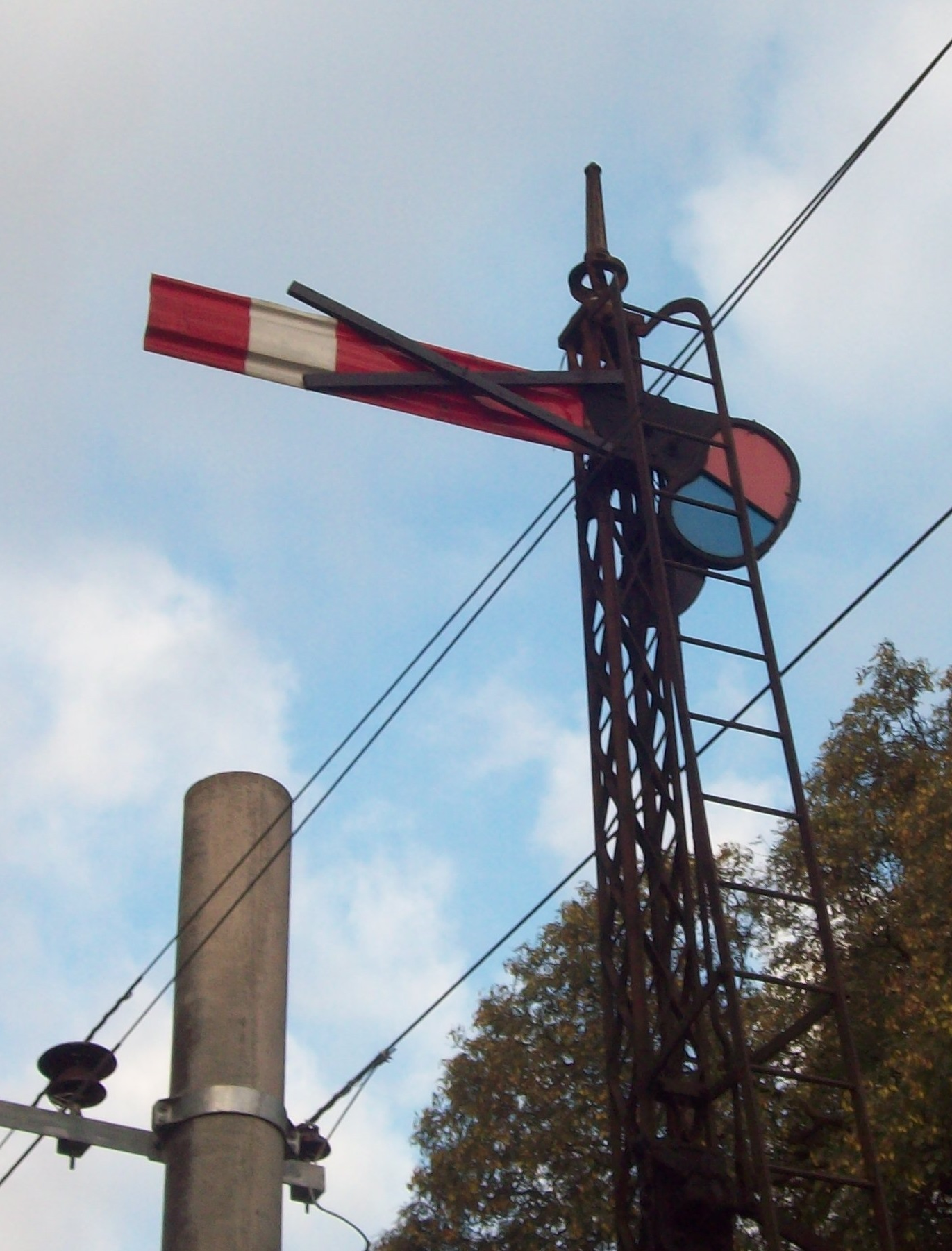 Señal fuera de servicio en Florencio Varela, 2017.